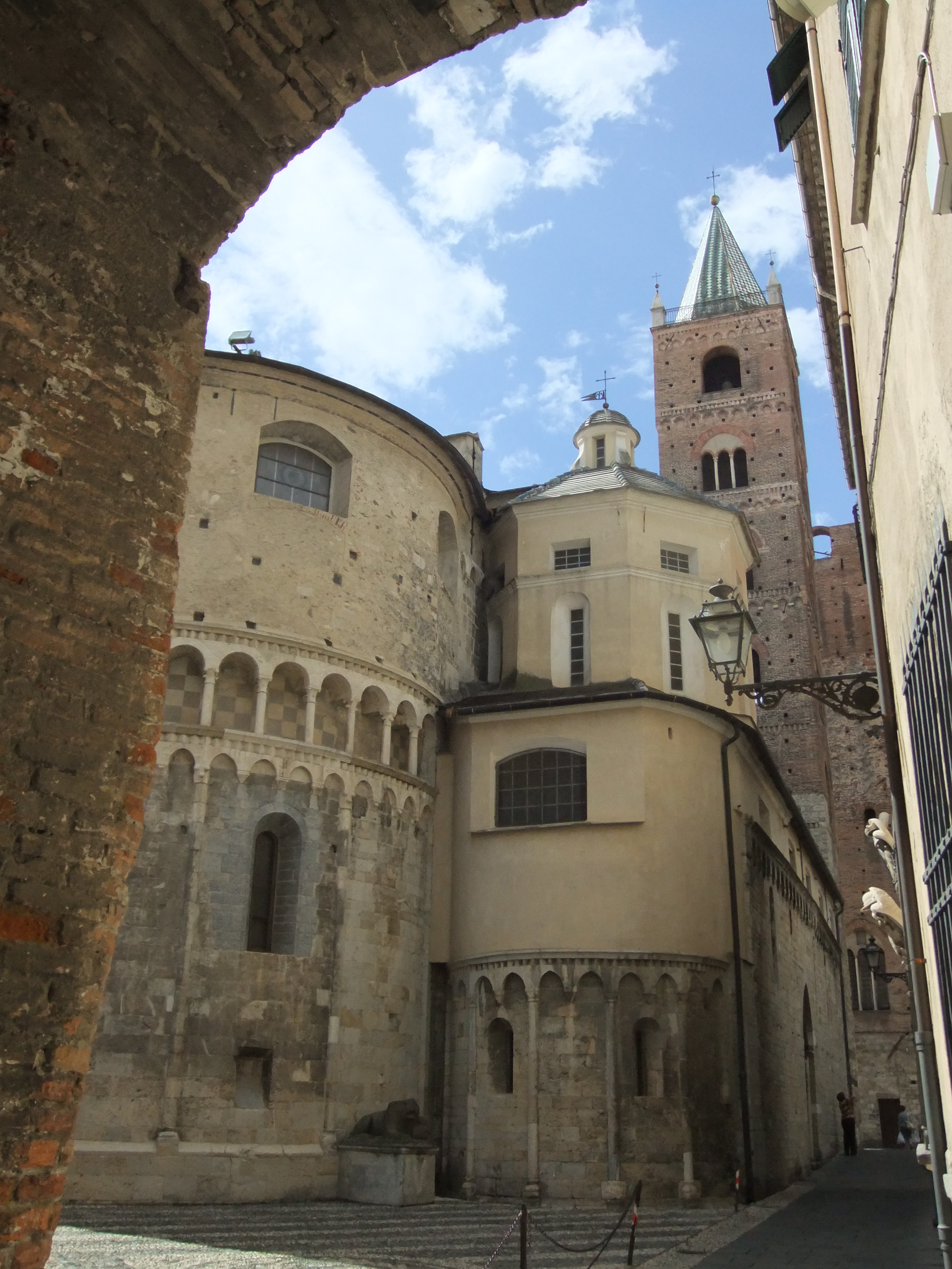 L'abside esterna della cattedrale di Albenga, Italy